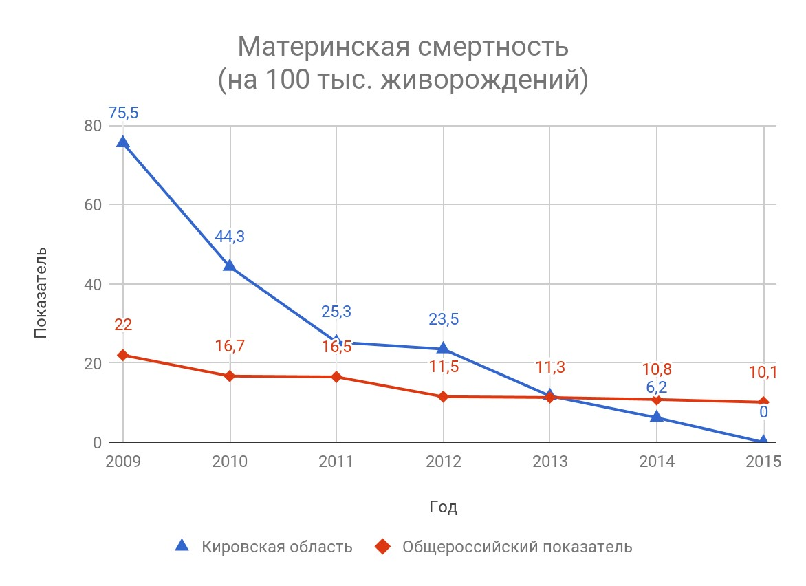 Показатель